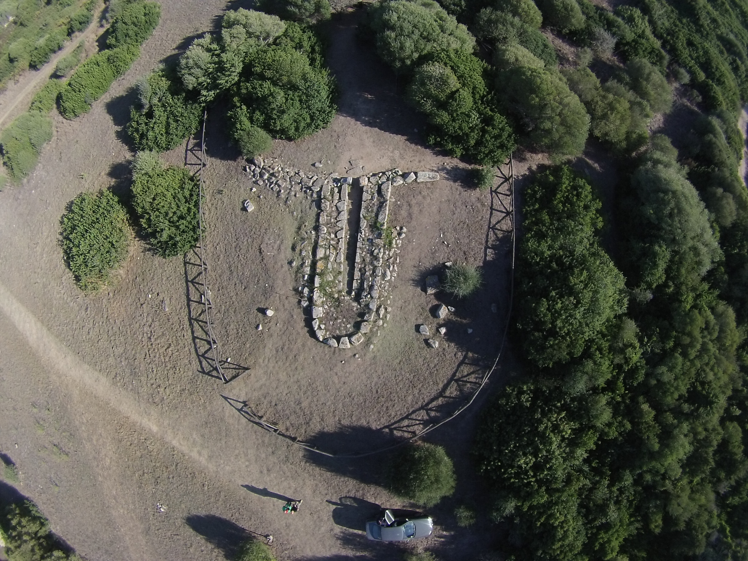 Nuraghe Lu Brandali This is a photo of a monument which is part of cultural heritage of Italy.